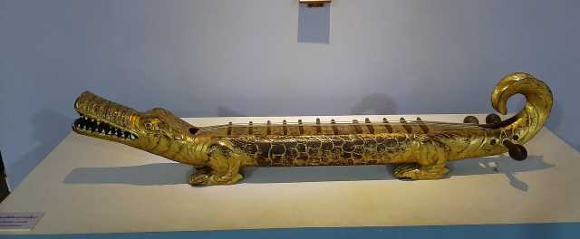 မြန်မာဘာသာ: မိကျောင်းတူရိယာသည် အငြိမ့်တီးမျိုး ၆ ပါးတွင် အပါ အဝင်ဖြစ်သော တူရိယာဖြစ်၏။